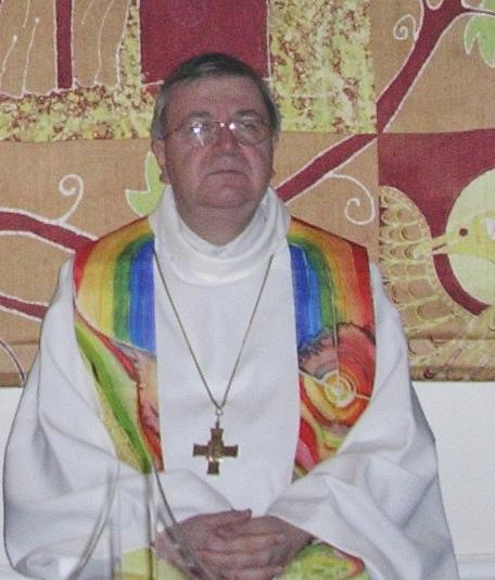 Weihbischof Dr. Otto Georgens am 26.01.2005